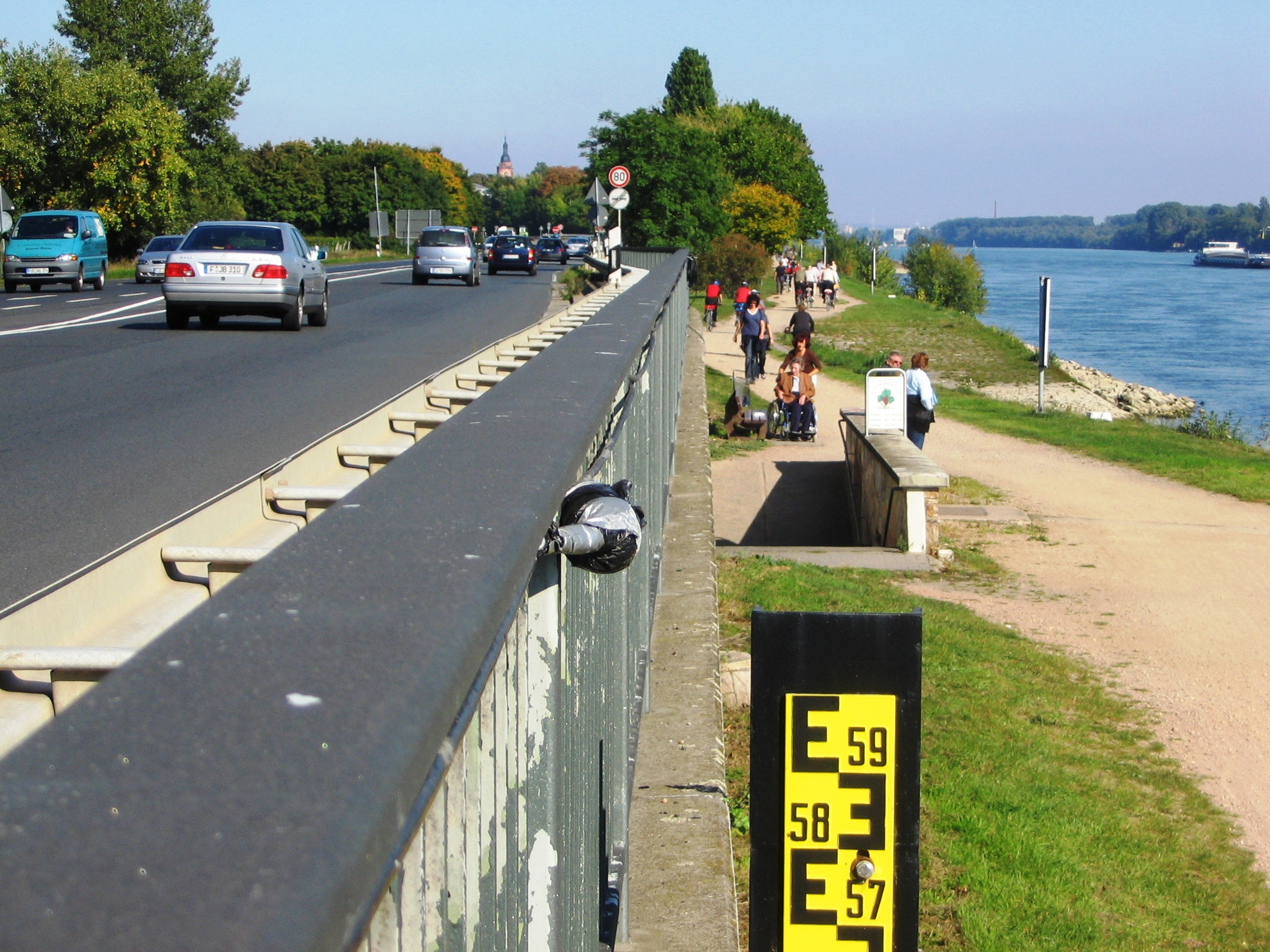 Rheinpegel an der Bundesstraße 42 bei Stromkilometer 513. Die Anzeige am Pegelstab reicht bis 6,00 Meter. Bei 5,46 Meter wird hier die Fahrbahn überspült, bei 6,08 Meter steht die Leitplanke unter Wasser. Im Jahr 1988 wurde hier ein Pegel von 5,80 Meter erreicht. Zum Aufnahmezeitpunkt zeigte der Pegel etwa 1,50 Meter.